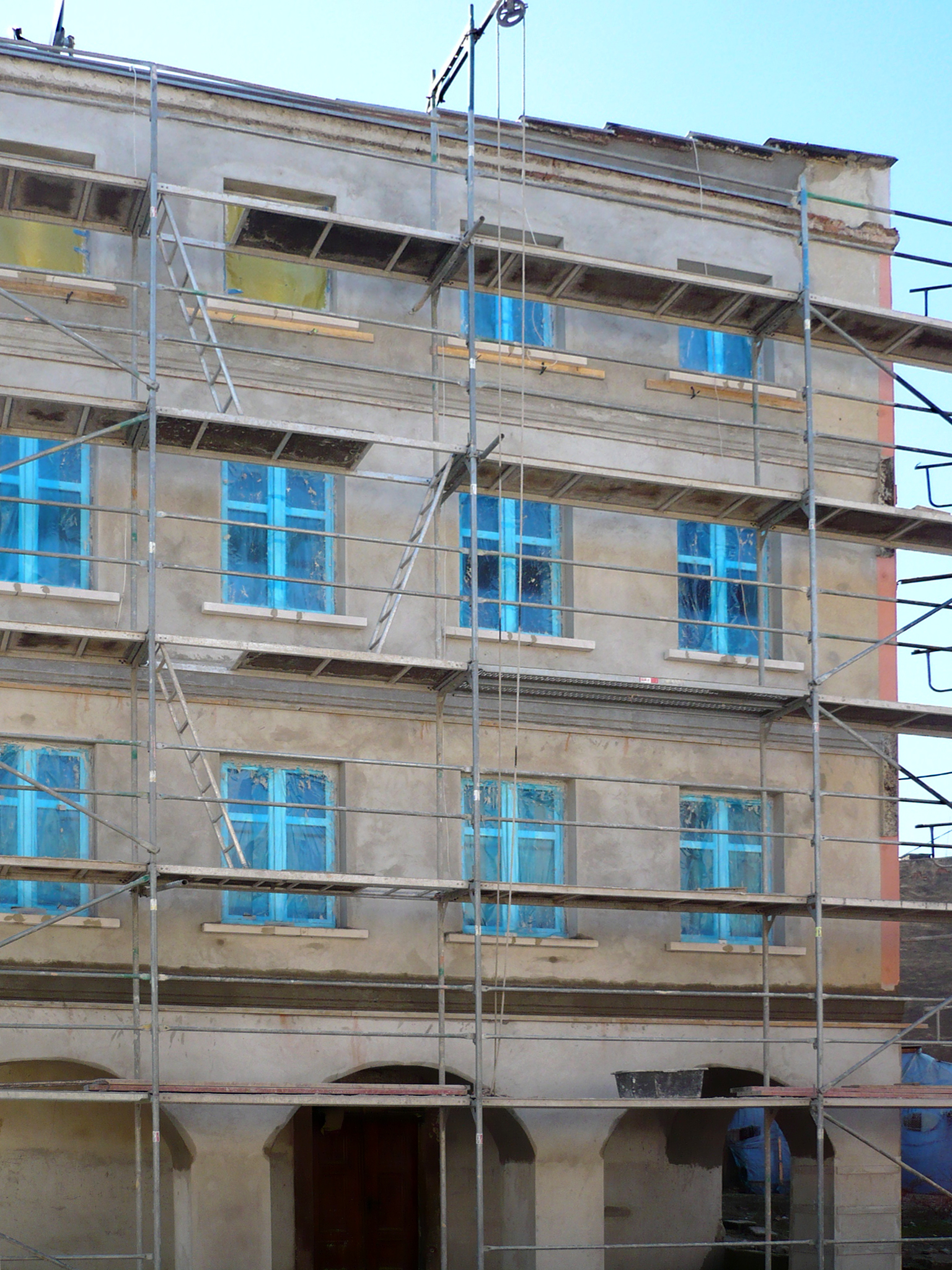 Nowa Ruda, ul. Łukowa 10 - dom, XIX w. (zabytek nr A/941/1565 z 16.03.1966)